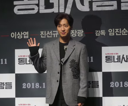 Lee Sang-yeob en la rueda de prensa de The Villagers